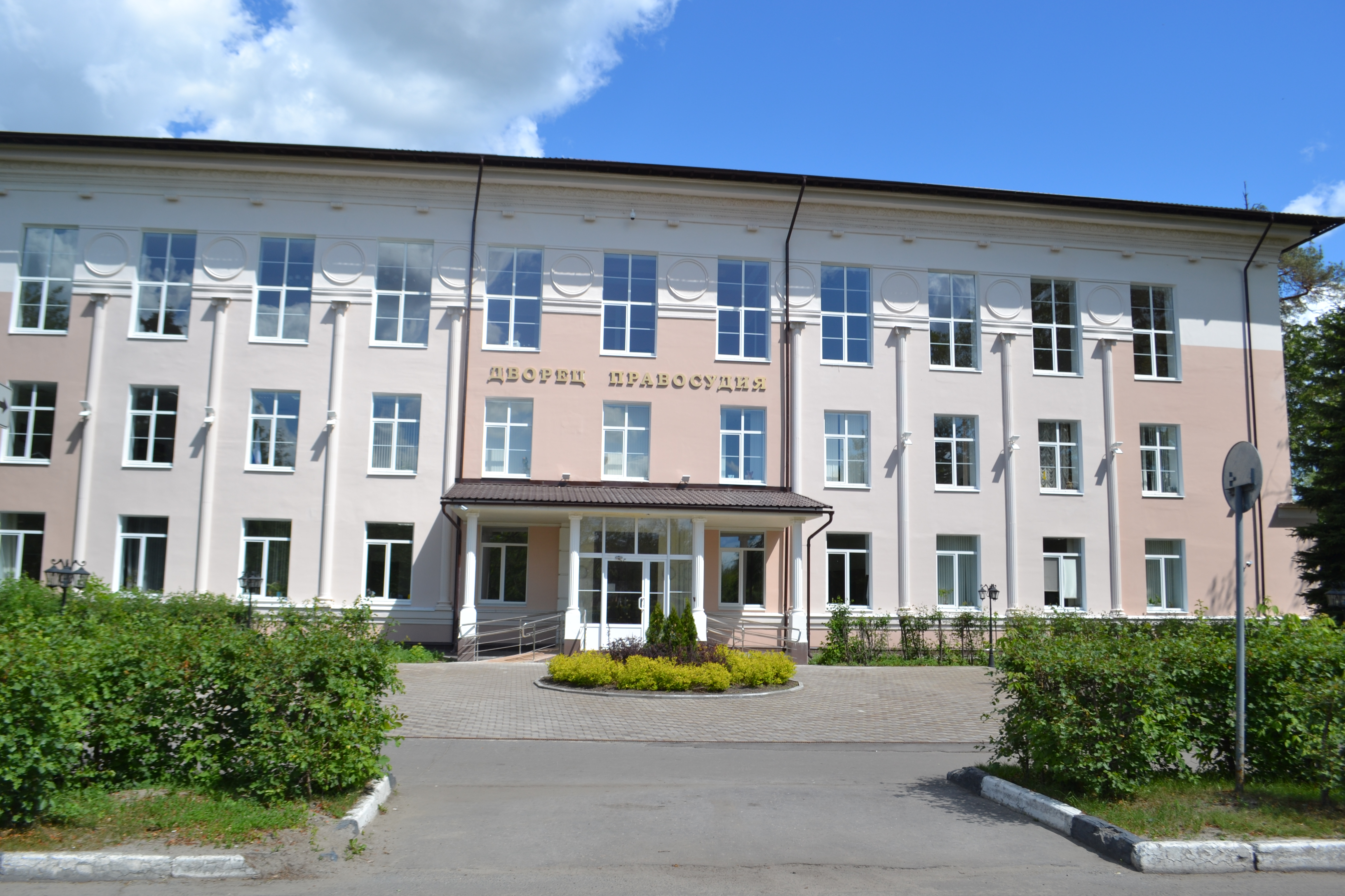 Дворец правосудия (Шатура)